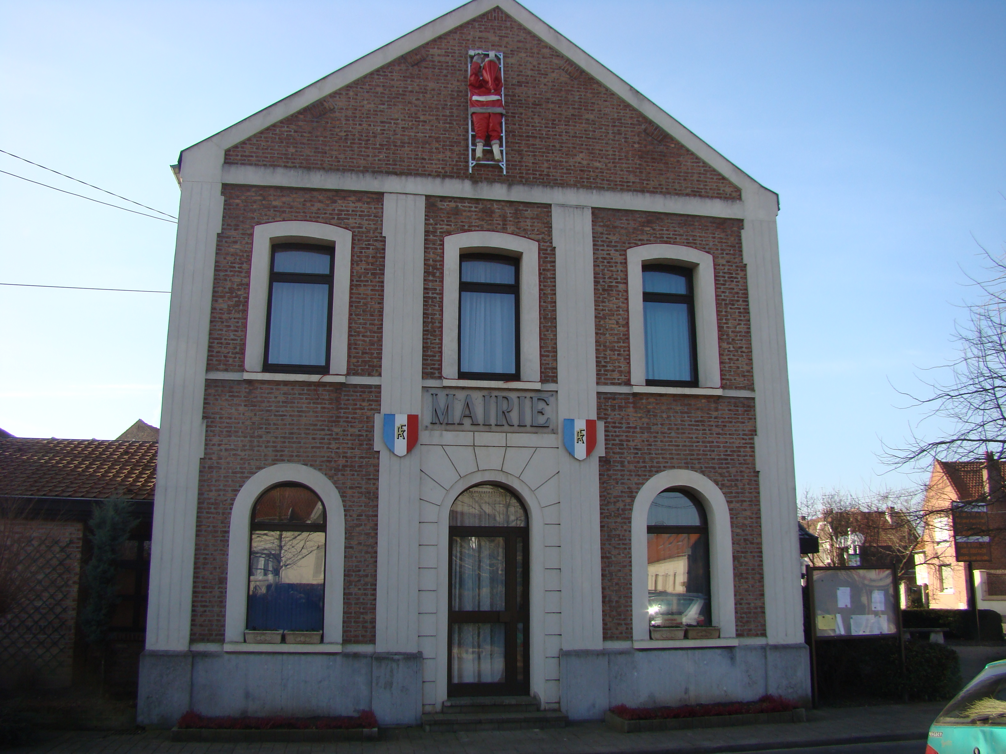 Mairie de Mastaing facade